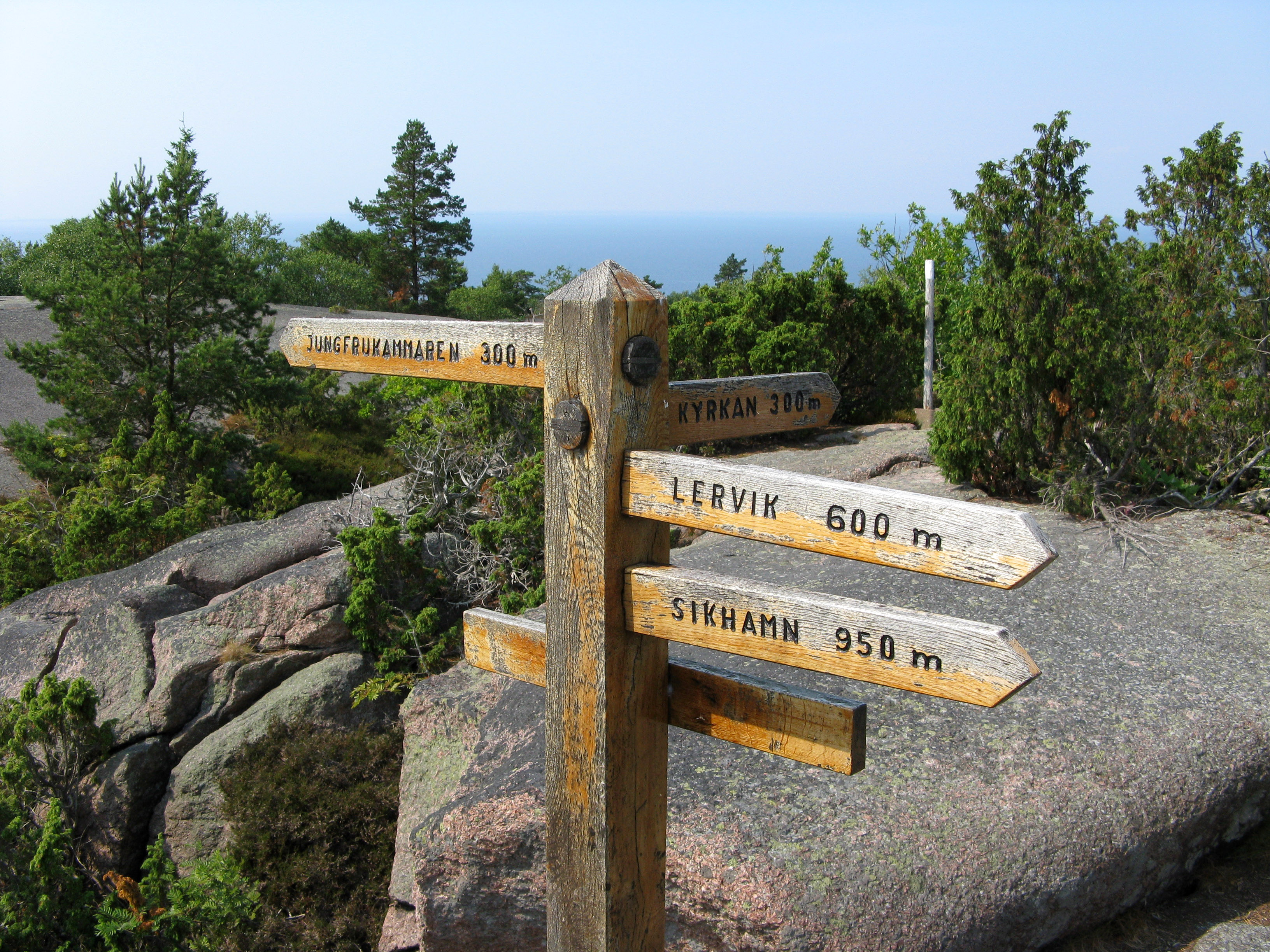 Vägvisare på toppen av nationalparken Blå Jungfrun.